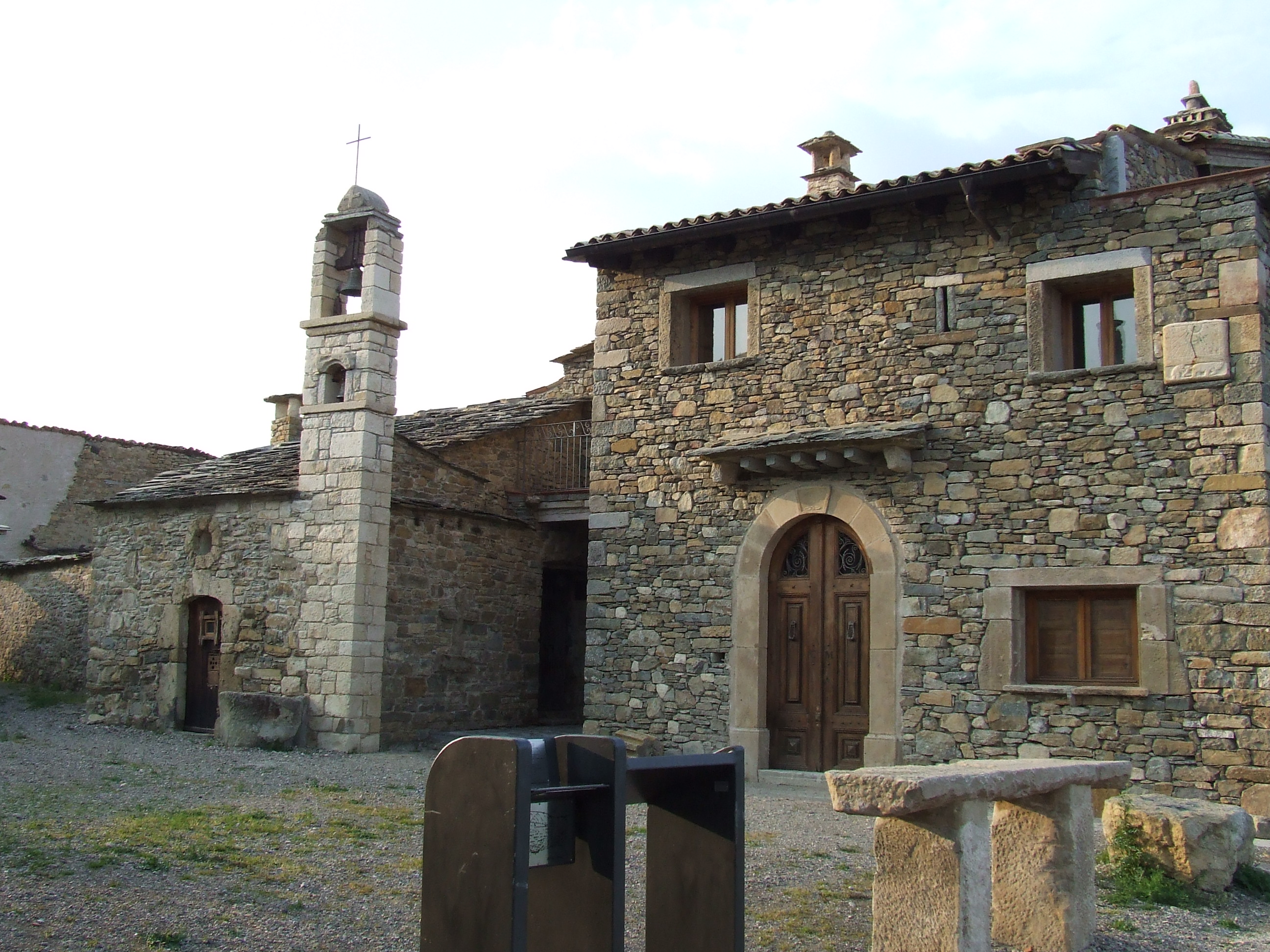 La plaça del poble de Vilamolat de Mur (Mur, Castell de Mur, Pallars Jussà)